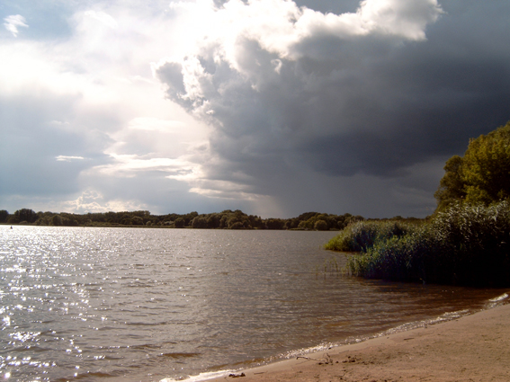 Der Wendsee von Norden